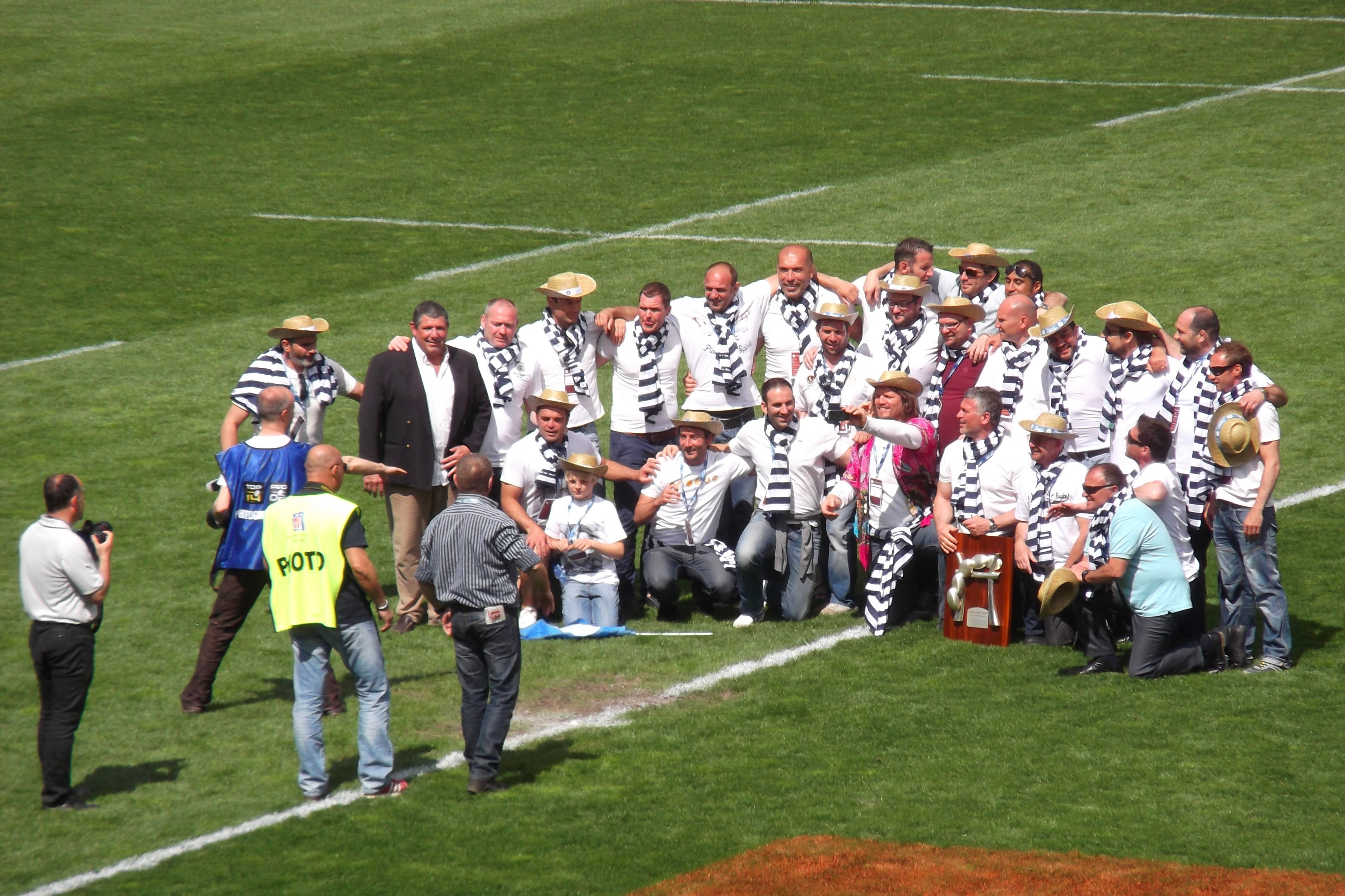 Anciens de la saison 2002-2003 du MHR (vainqueurs pro-D2), mi-temps du match MHR-USAP.